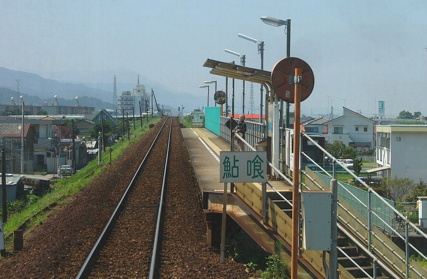 鮎喰駅ホーム